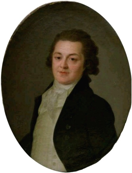 Бутурлин Дмитрий Петрович (1763-1829), государственный деятель, библиофил.